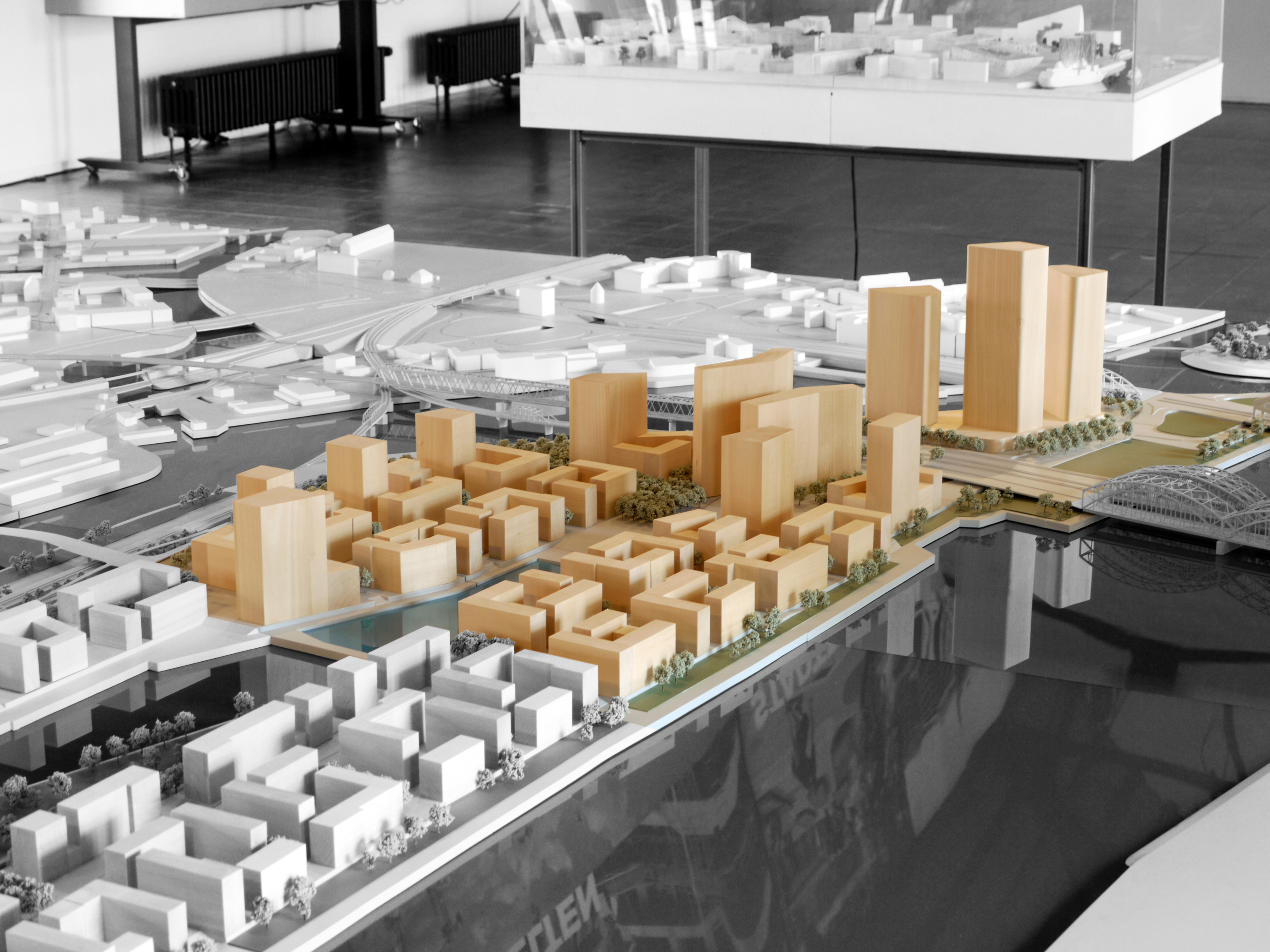 Modell des Quartiers Elbbrücken in der HafenCity in Hamburg.